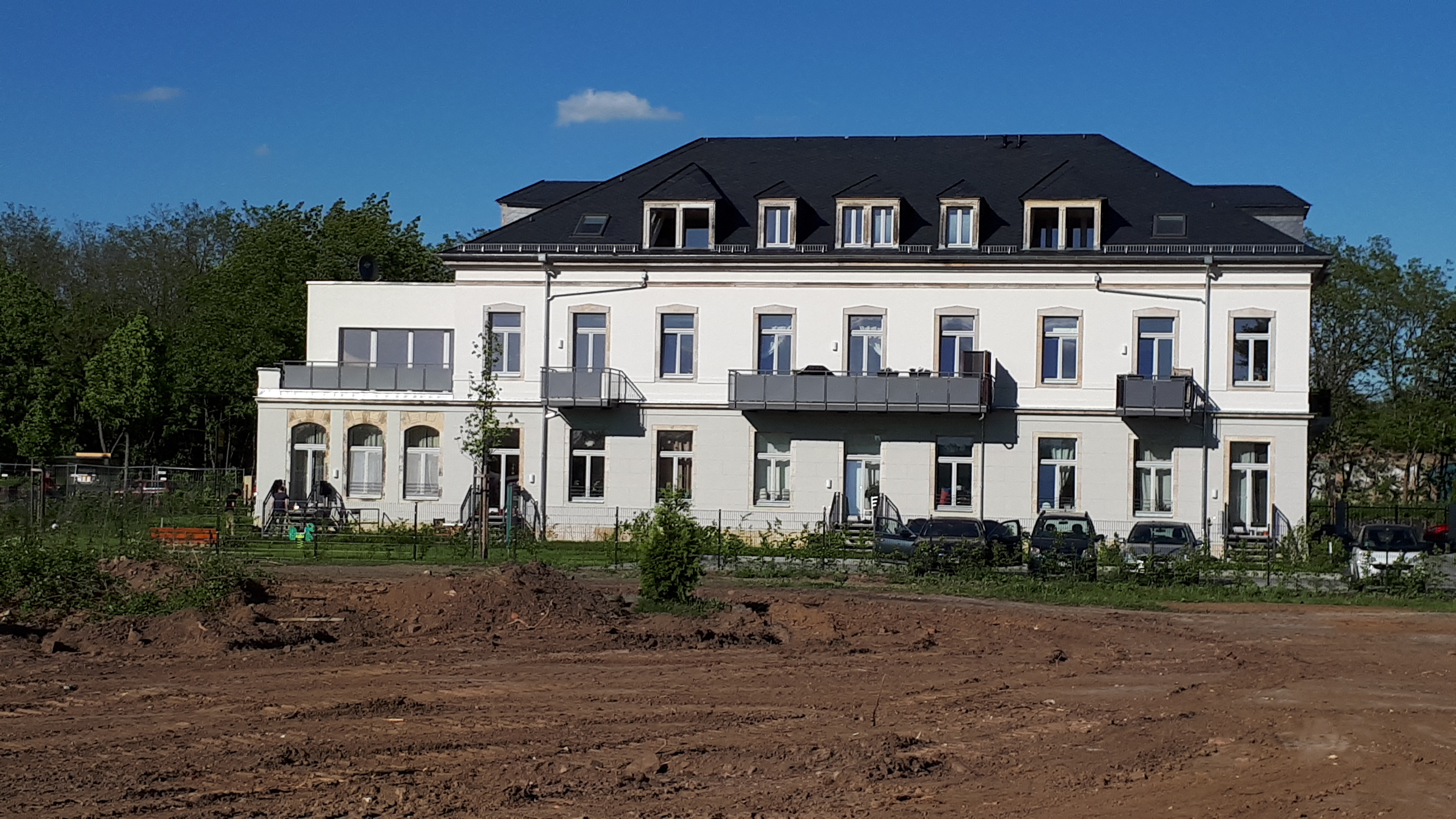 Villa Leipziger Straße 27, Dresden - Ansicht von Südwesten